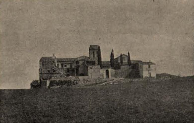 Santa Creu d'Olorda - Rectoria, església i cementir a principis del segle XX